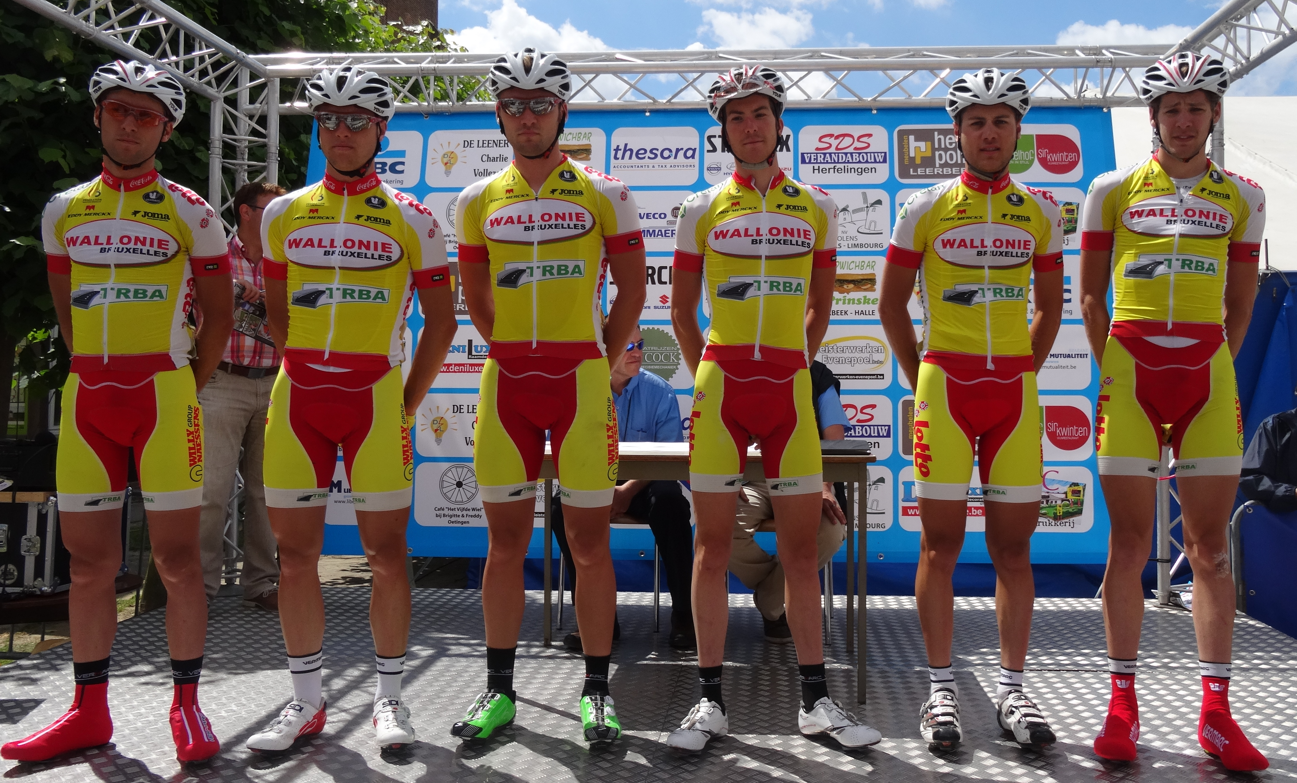 Reportage photographique réalisé le mercredi 25 juin à l'occasion du départ et de l'arrivée de l'Internationale Wielertrofee Jong Maar Moedig 2014 à Oetingen (Gooik), Belgique.